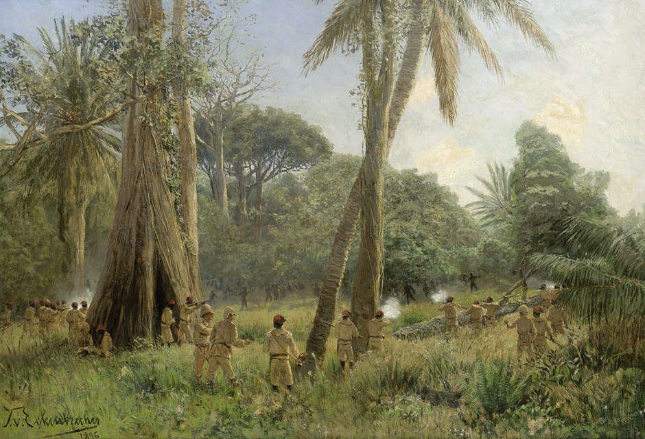 Themistokles von Eckenbrecher: Tropische Landschaft in Deutsch-Ostafrika mit Feuergefecht zwischen den deutschen Kolonialherren mit den Askari und der einheimischen Bevölkerung. Öl auf Malpappe. 69 x 104 cm. Unten links signiert und datiert "T. v. Eckenbrecher 1896". Karl Paul Themistokles von Eckenbrecher (1842–1921) Alternative namesKarl Paul Themistokles von EckenbrecherDescriptionGerman singer-songwriterDate of birth/death17 November 18424 December 1921Location of birth/deathAthensGoslarAuthority control : Q884197 VIAF: 37190288 ISNI: 0000 0000 6661 8832 ULAN: 500080315 LCCN: n85264459 GND: 117496782 WorldCat